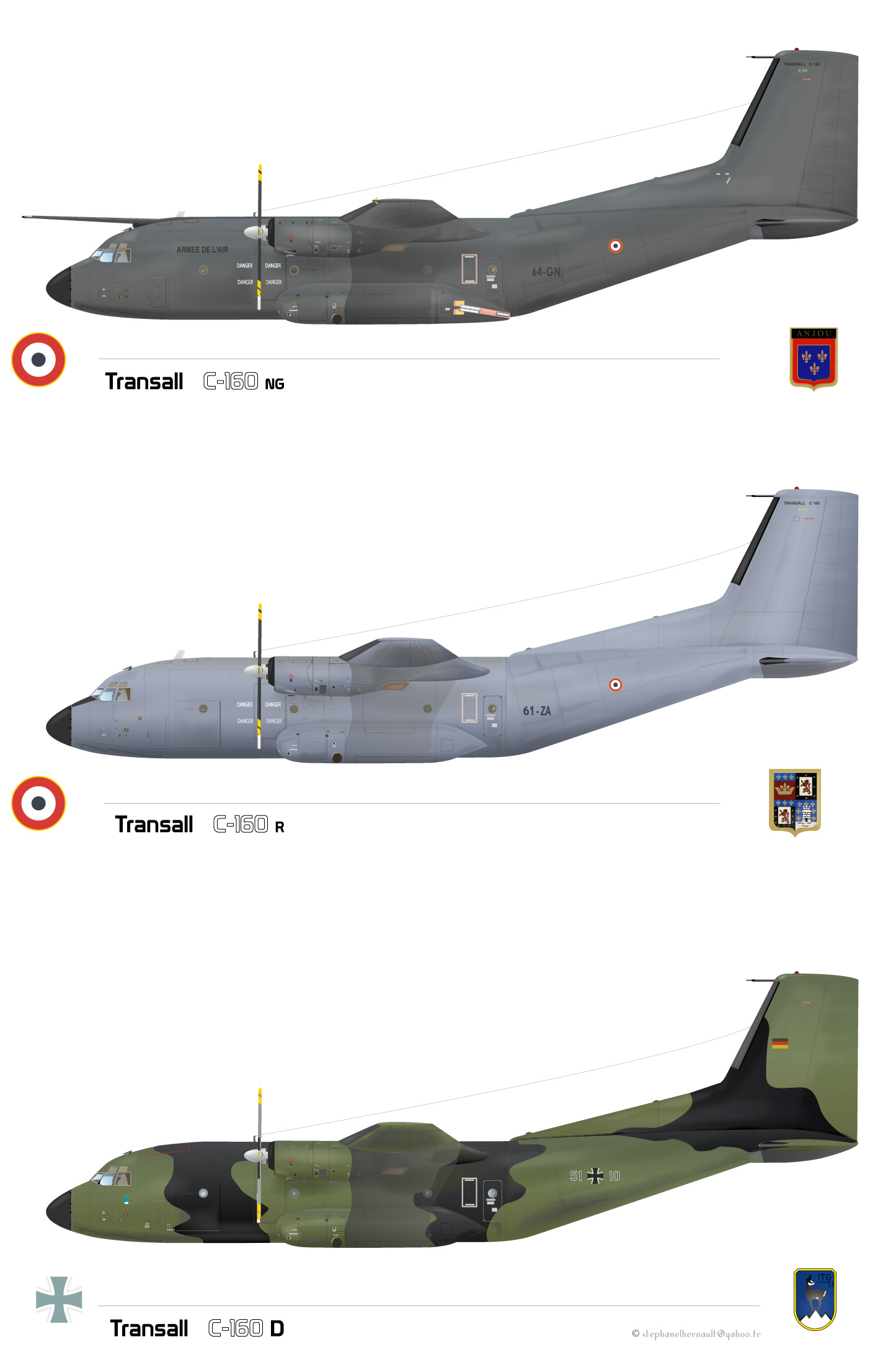 Transall C 160 armé de l'Air et Luftwaffe